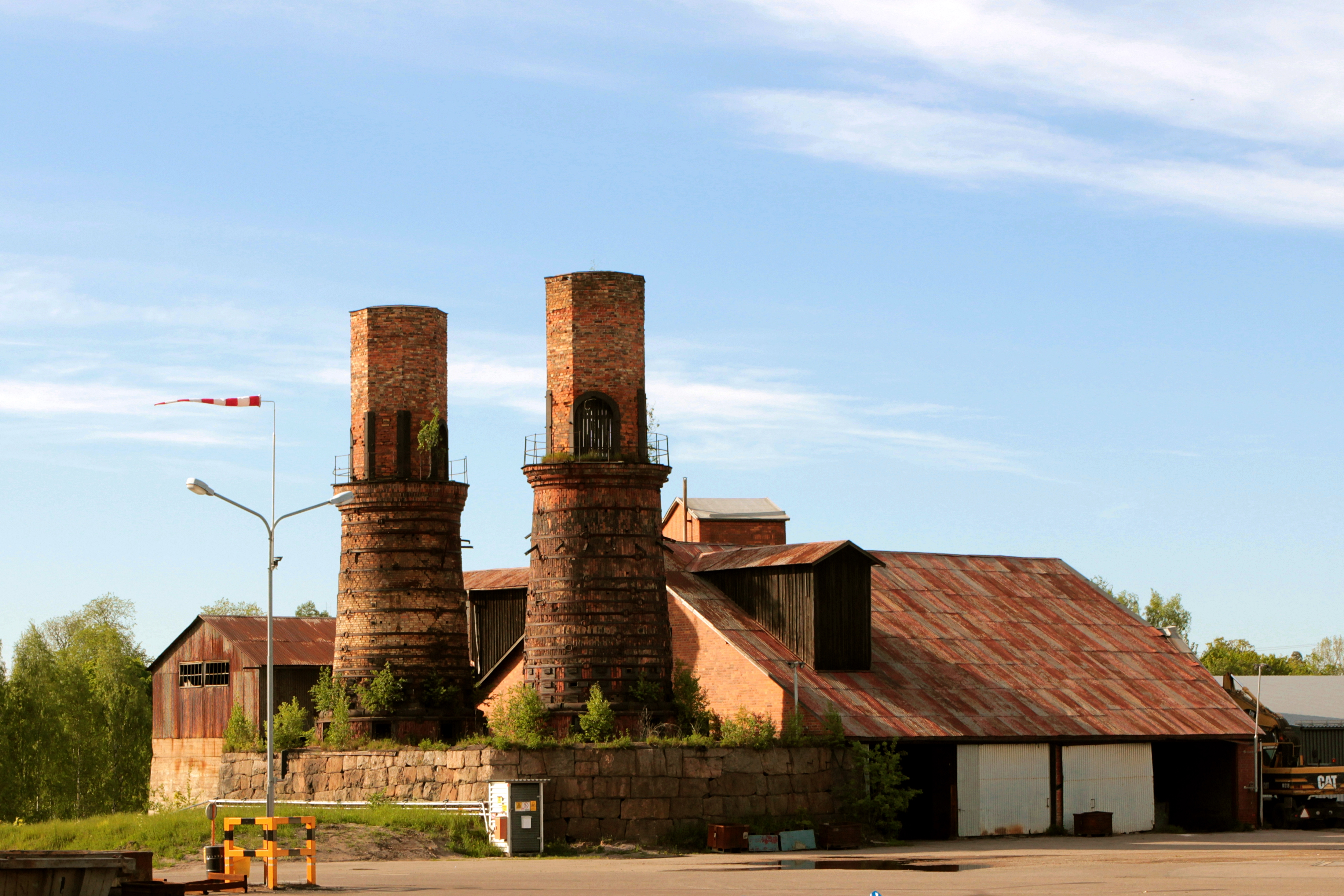 Söderfors bruk. Foto uppladdat som en del i Bergslagssafarin 26 maj 2012.